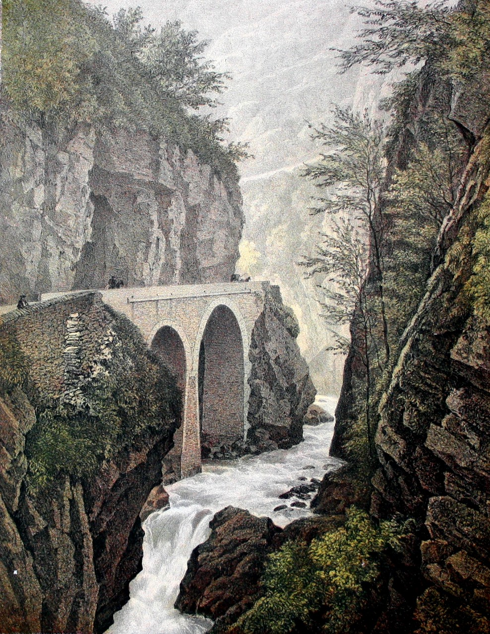 Lithographie extraite de "Promenades dans les Pyrenees. Vues, Sites, Costumes et Moeurs les plus remarquables de ce Pays Intéressant." Par Ch. Mercereau et Ch. Maurice. - Paris, ca. 1850